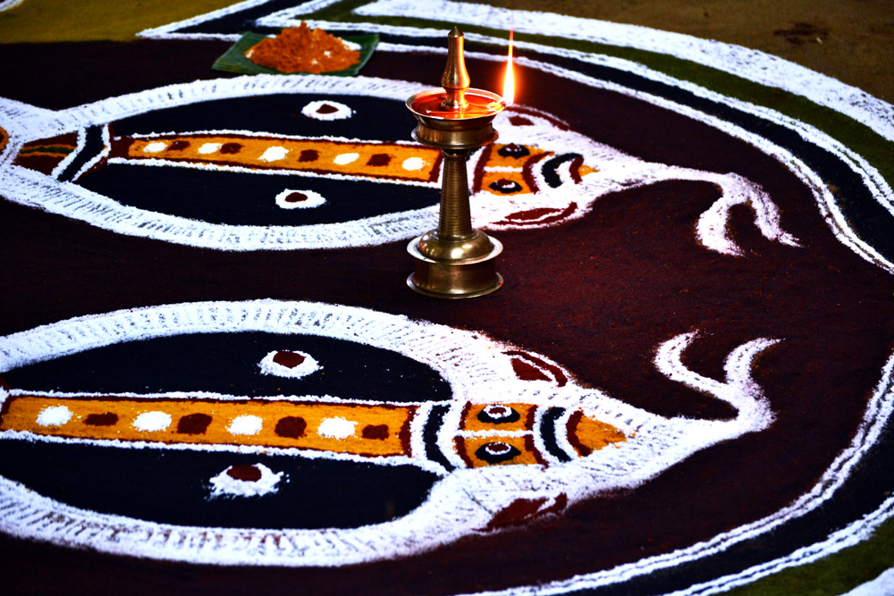 നാഗ കളത്തിന്റെ ചിത്രം